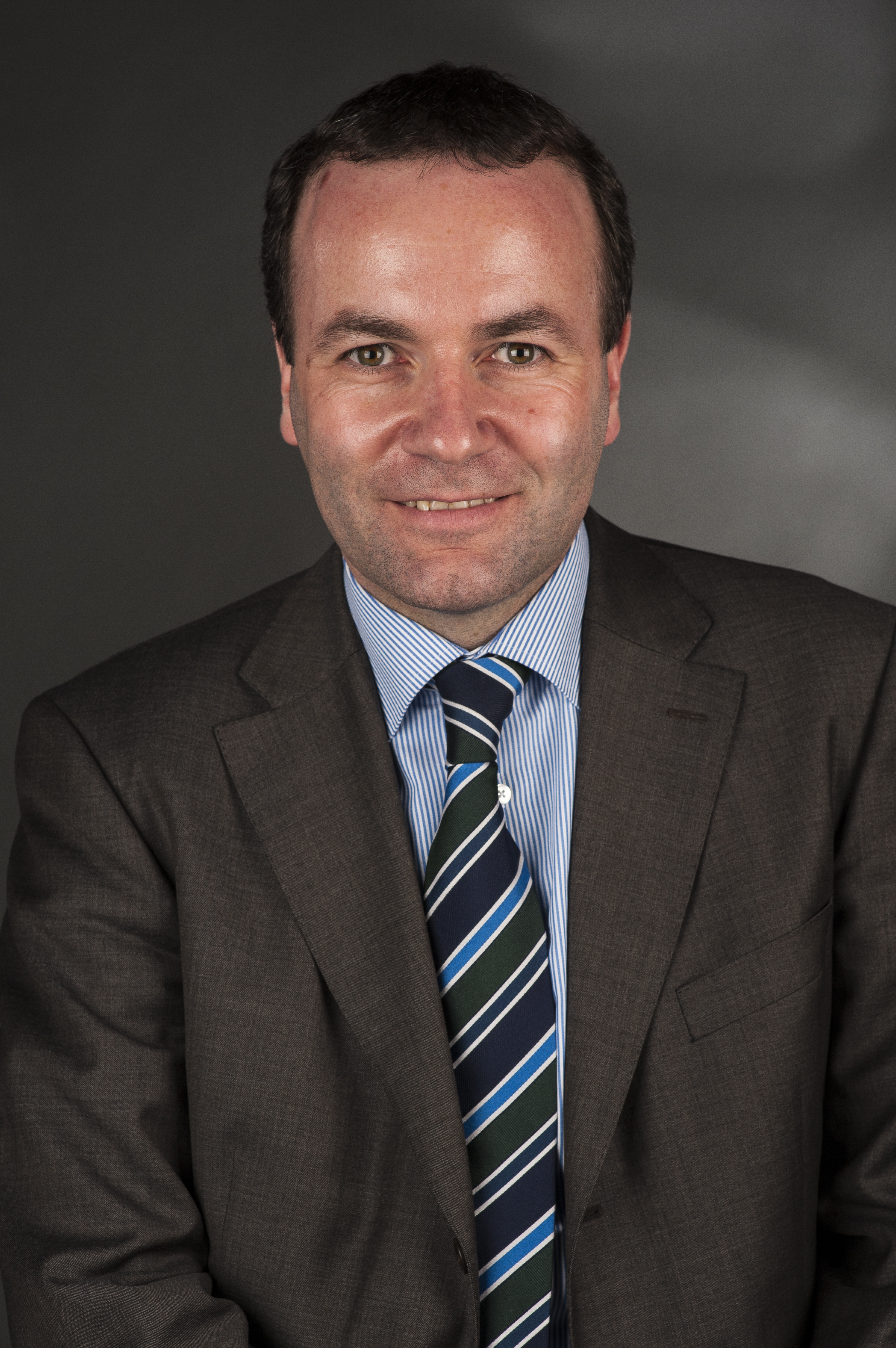 Manfred Weber